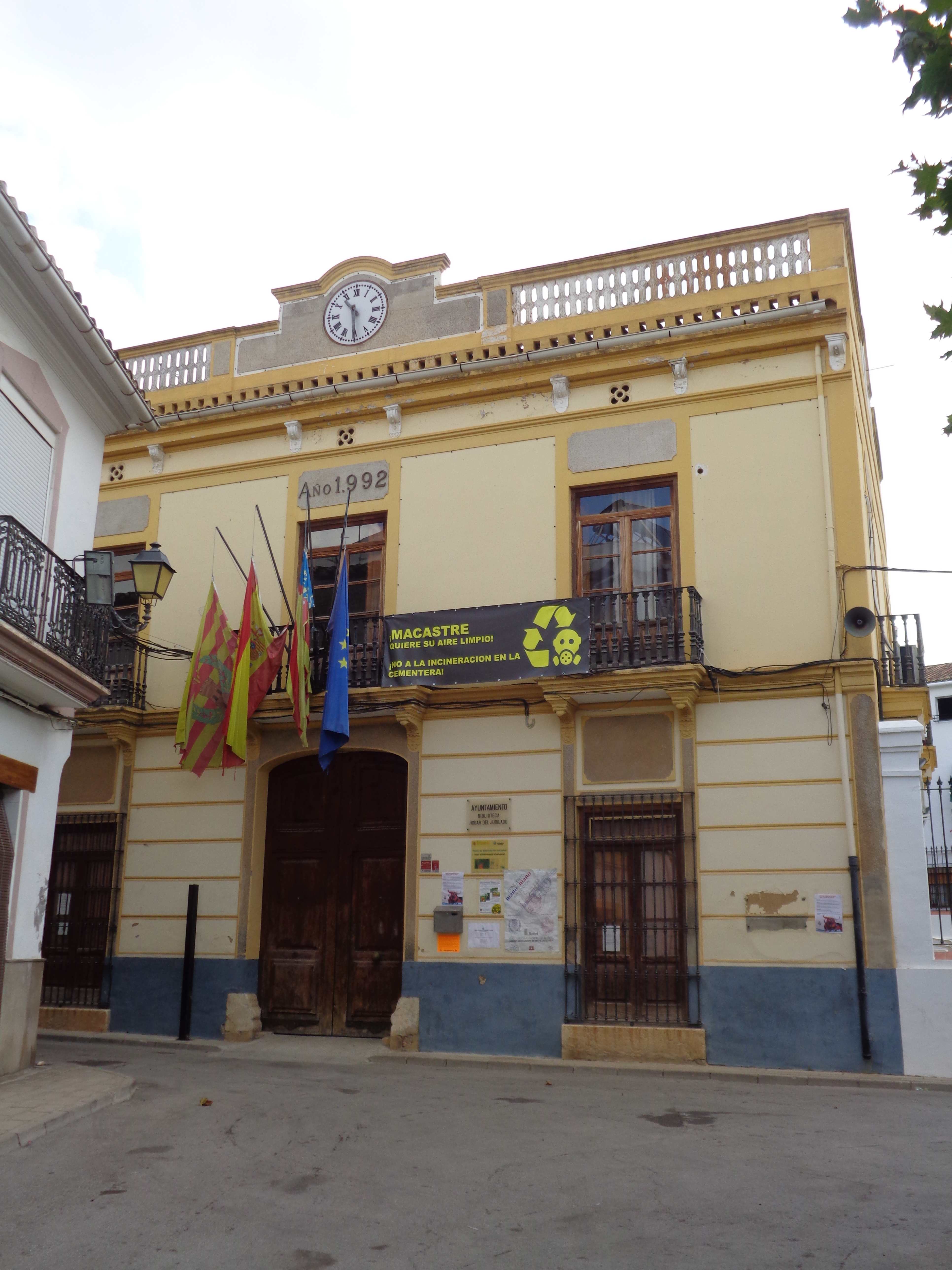 Macastre.